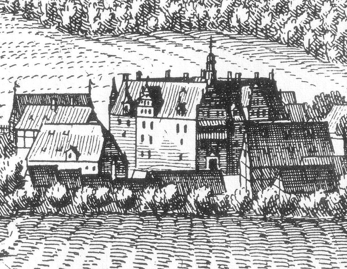 Schloss Oelber als Merian Stich von 1650